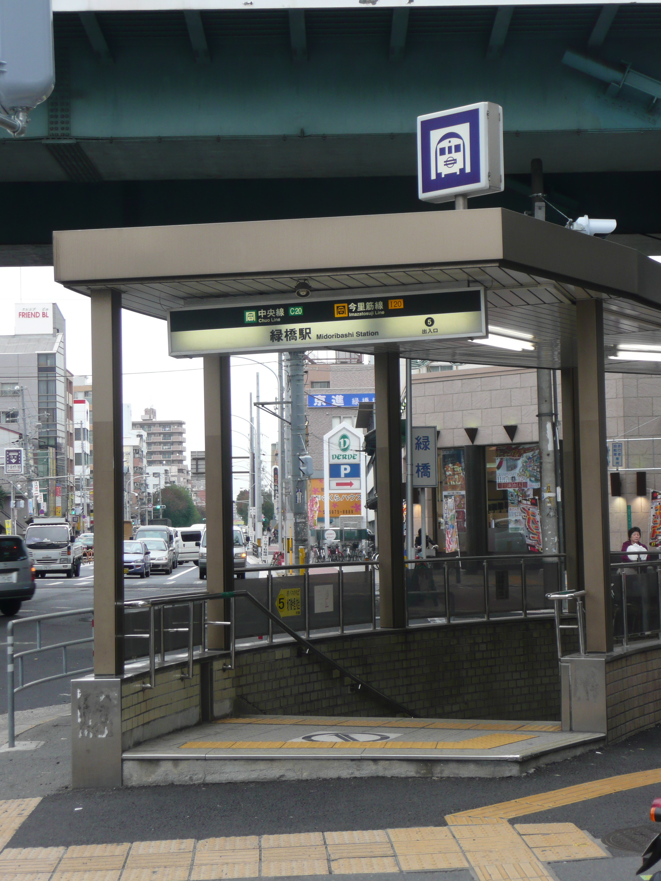 緑橋駅